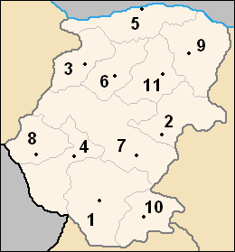 Sujet : carte des obchtini (municipalités) de l'oblast de Montana, en Bulgarie Auteurs : Потребител:Ljubo (Любомир Таушанов = Lyoubomir Taouchanov), pour la version originale en bulgare, Utilisateur:Hégésippe Cormier, pour l'adaptation française (repères chiffrés) Source : Картинка:Montana Oblast map.PNG (7 mai 2005) Licence